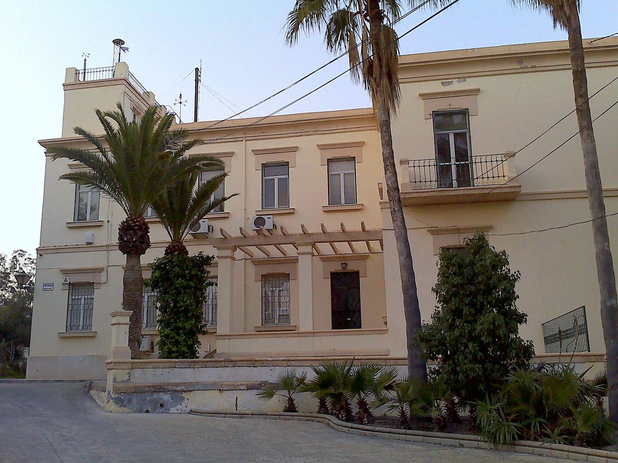 Centro sismológico y sede del Instituto Geofísico Nacional en Almería